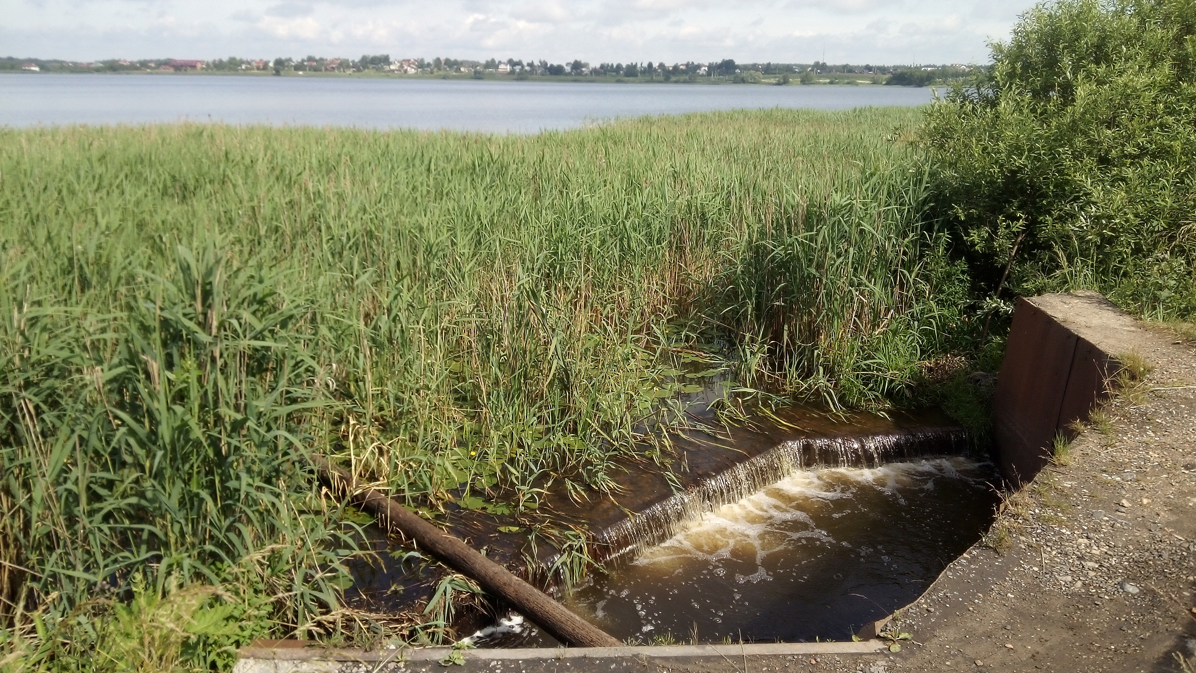 Мещериха вытекает из озера Круглое.